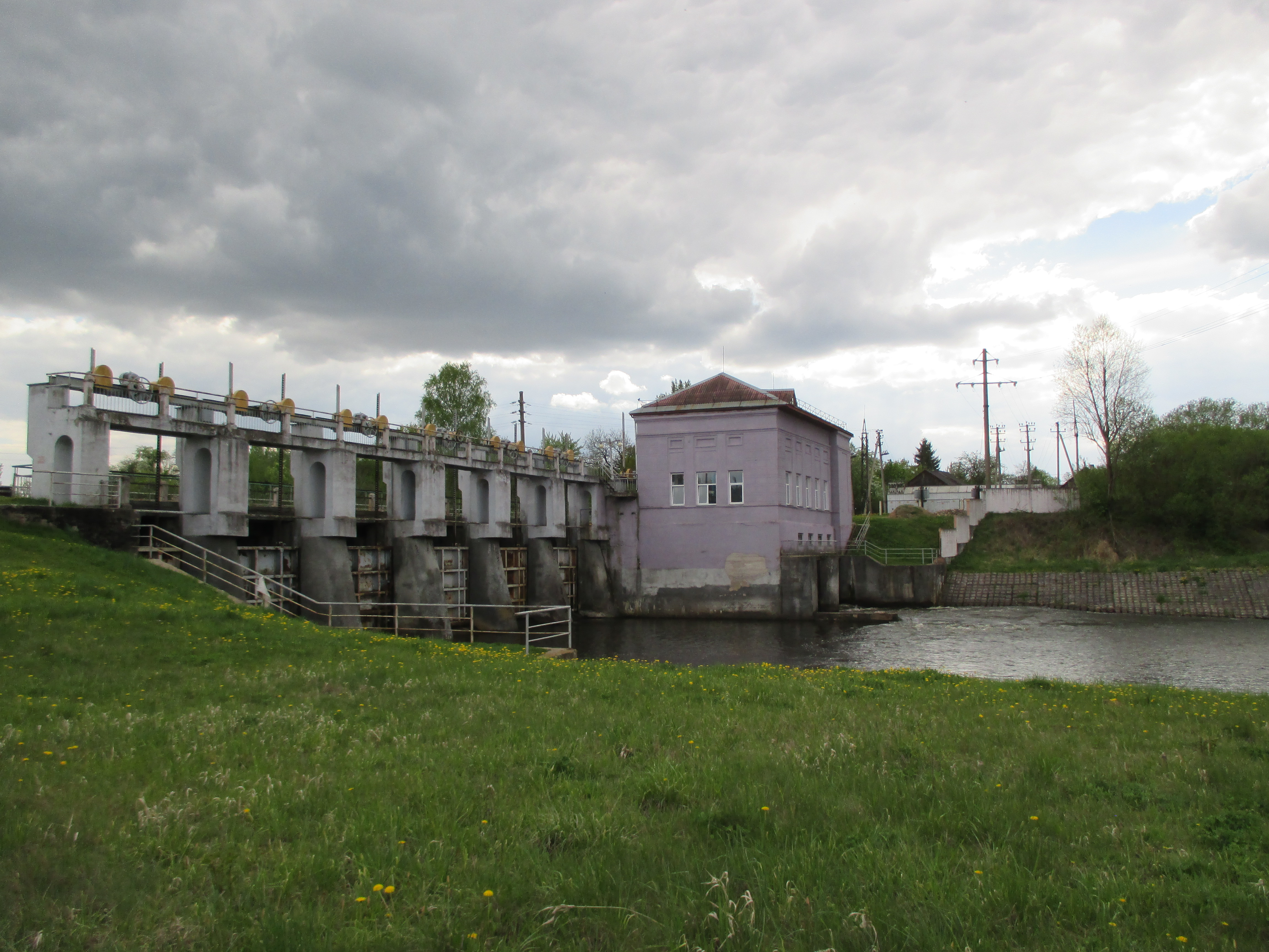 Гезгальская ГЭС